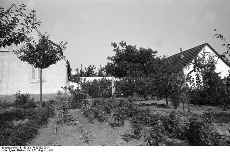 Stephanssiedlung für Ungarndeutsche in Darmstadt, 1977 eingemeindet in die Stadt Griesheim